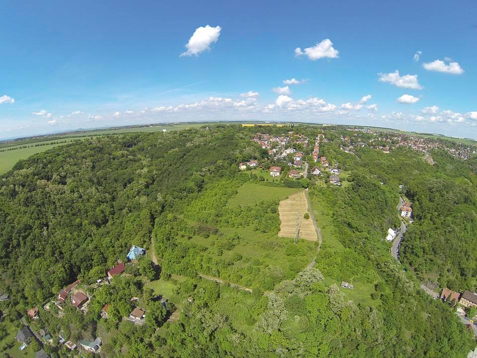 Letecká fotografie hradiště v Klecanech